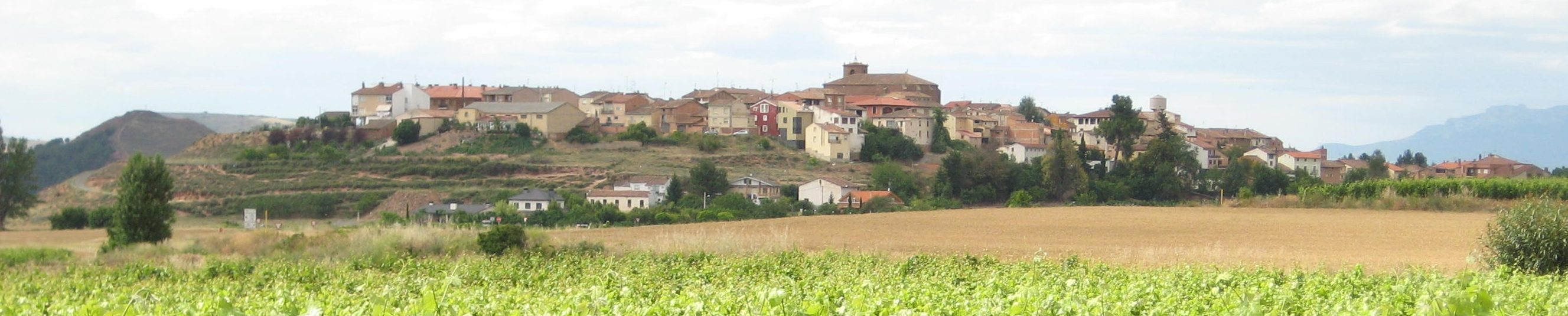 Vista panorámica de Tricio, La Rioja, España.